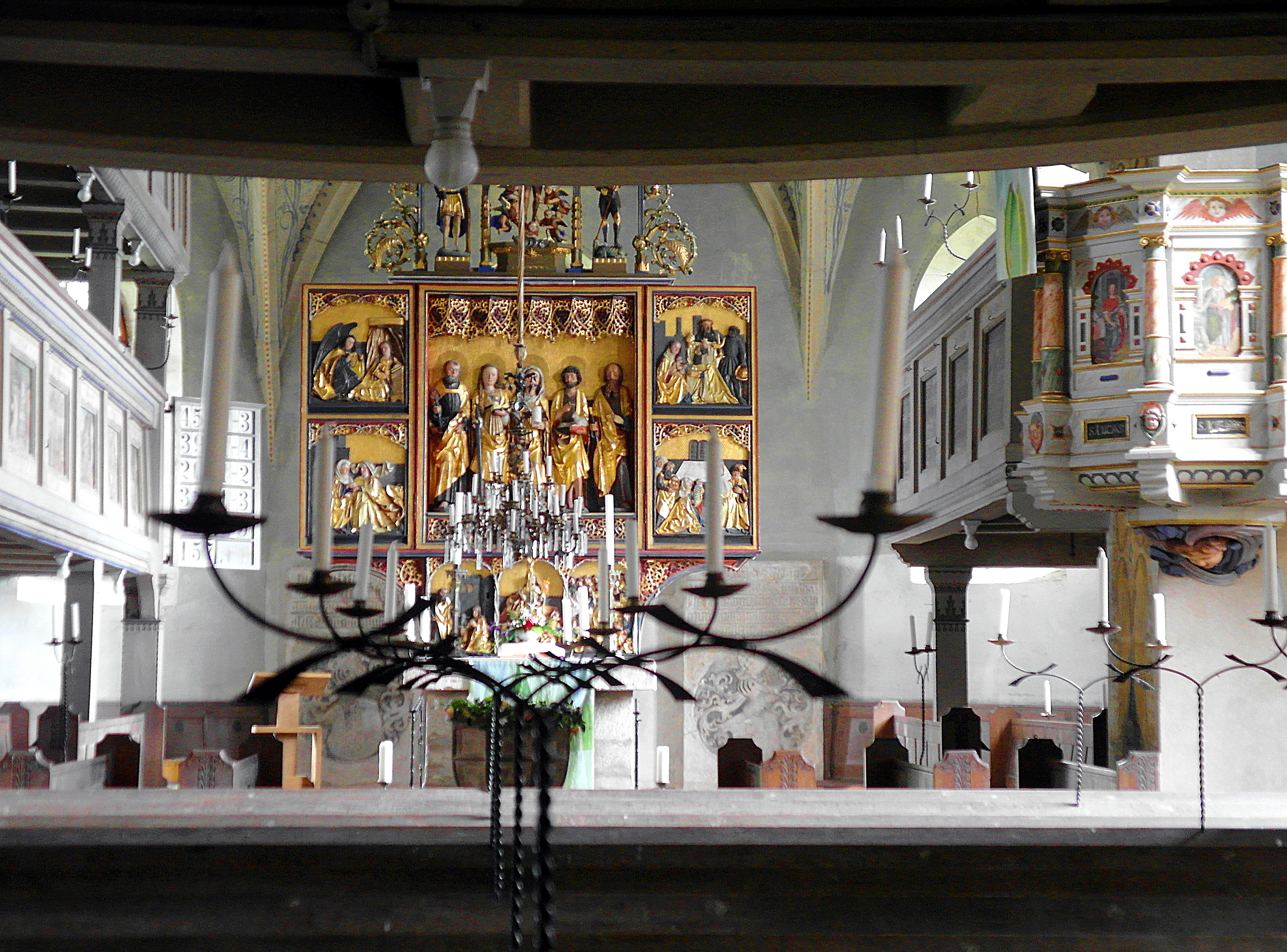 01.07.2014 01774 Höckendorf (Klingenberg): Dorfkirche, Kirchweg 1 (GMP: 50.926062,13.587406). Romanische Kirche in Höckendorf, um 1325 erbaut auf den Grundmauern der ehemaligen Burg bzw. des Rittergutes der Ritter von Theler) am Heiligen Weg. Hier der Blick aus dem Westvorraum zum spätgotischen Flügelaltar von 1515. [SAM4931.JPG]20140701115DR.JPG(c)Blobelt